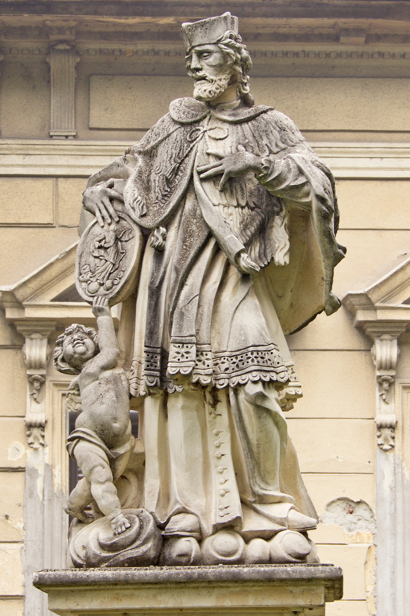 Statue des Heiligen Johannes Nepomuk (1729) im I. Bezirk Centru der Stadt Arad (Rumänien).